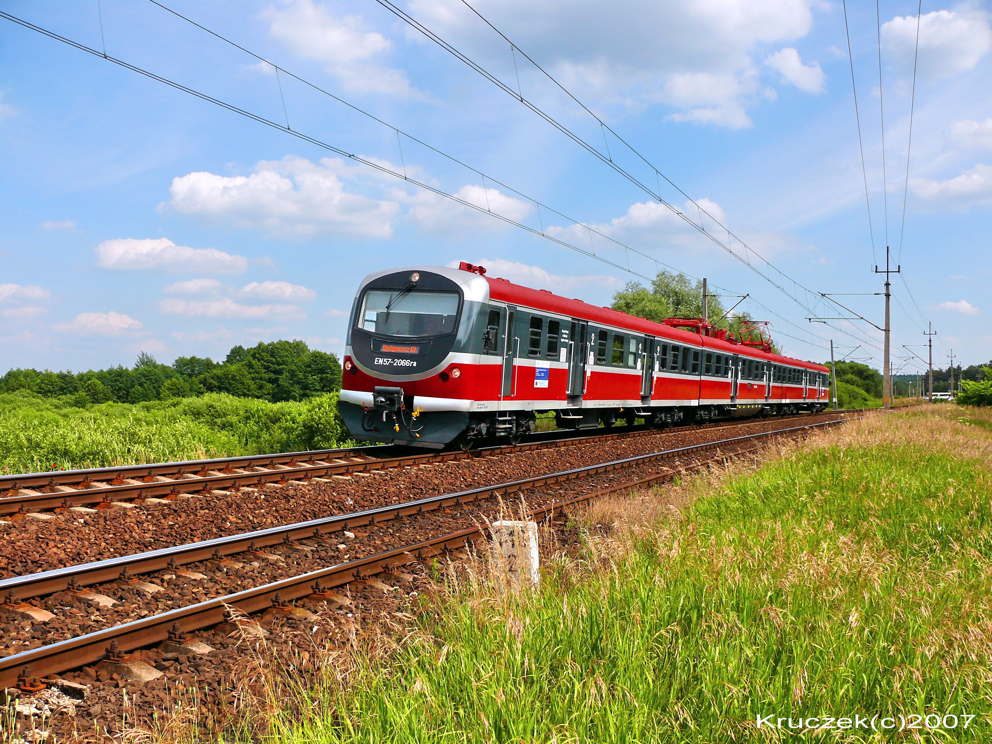 Bydgoszcz Plątnowo_EN57-2066_by kruczek